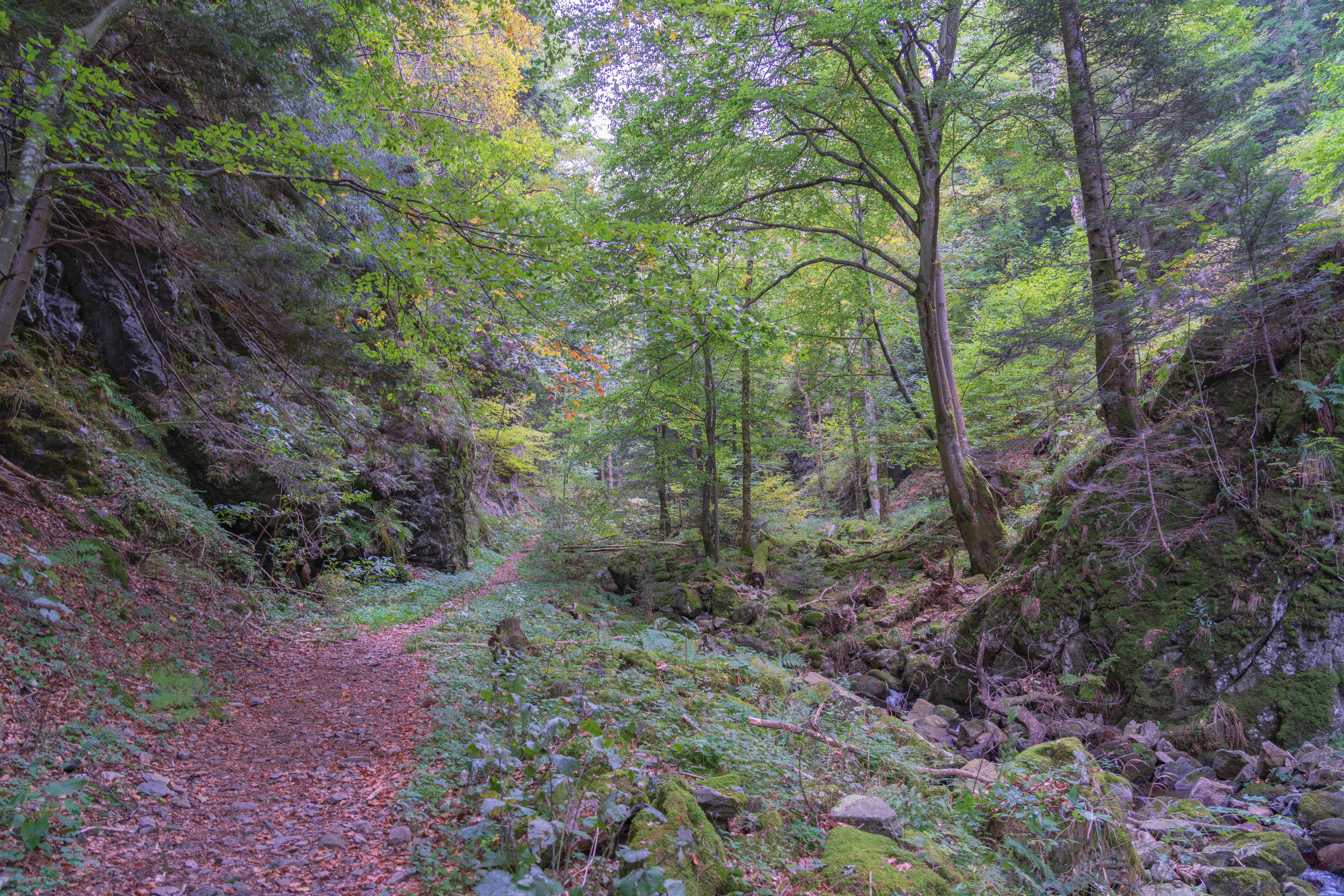 entlang dem Haslachsimonswälder Bach im Naturschutzgebiet Kostgefäll